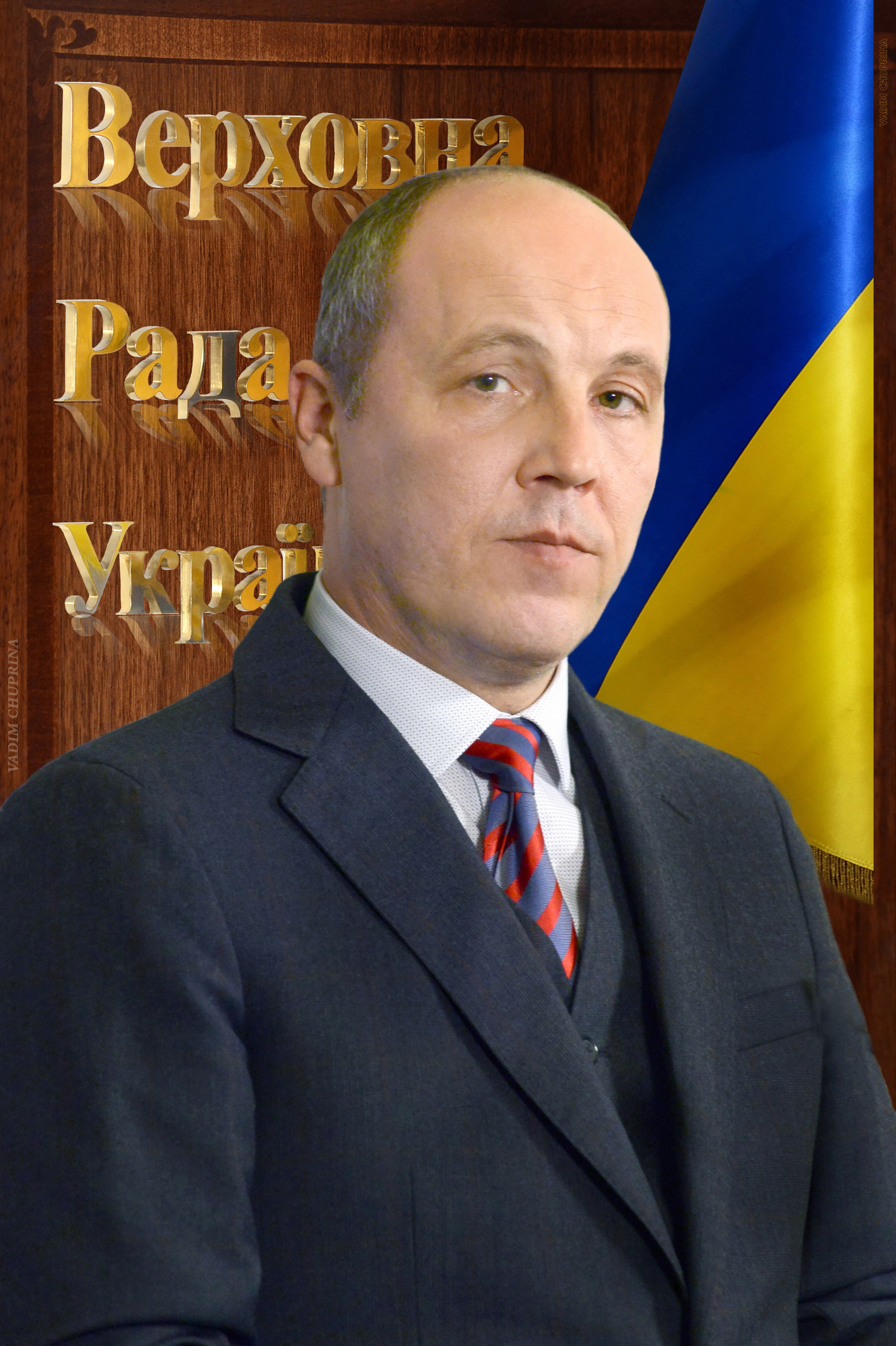 Парубій Андрій Володимирович 2016,фото Чуприны Вадима